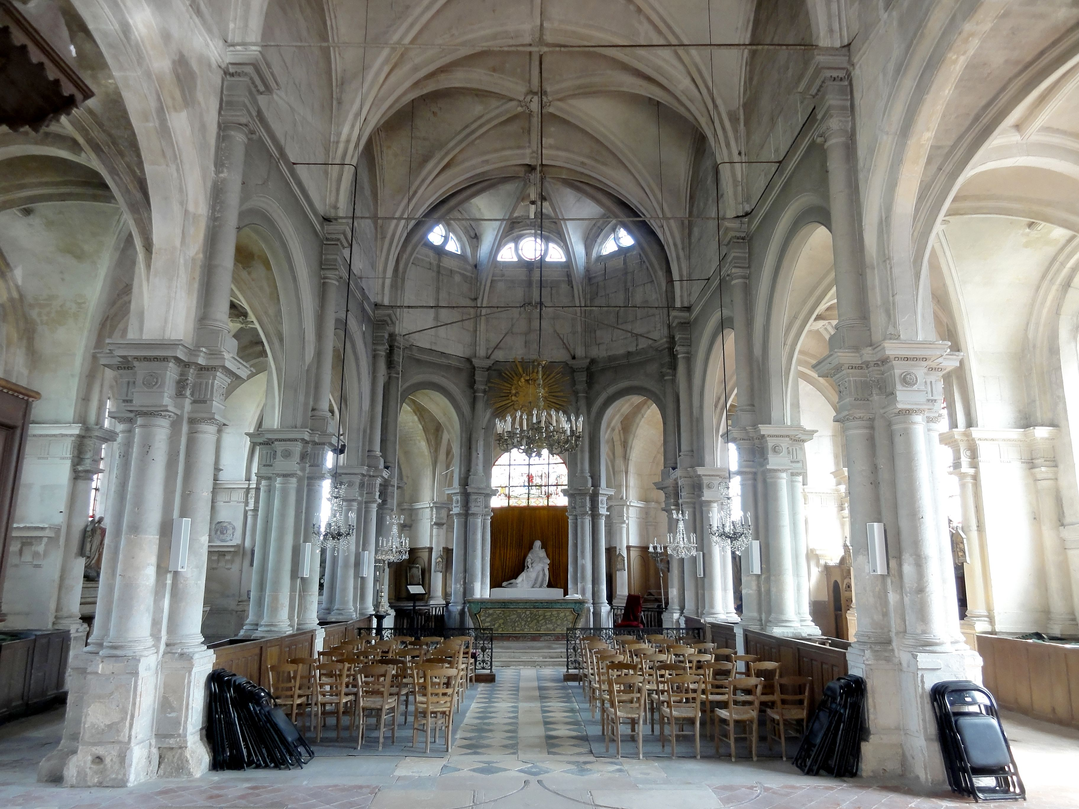 Nef, vue vers l'est nef, vue vers l'est.